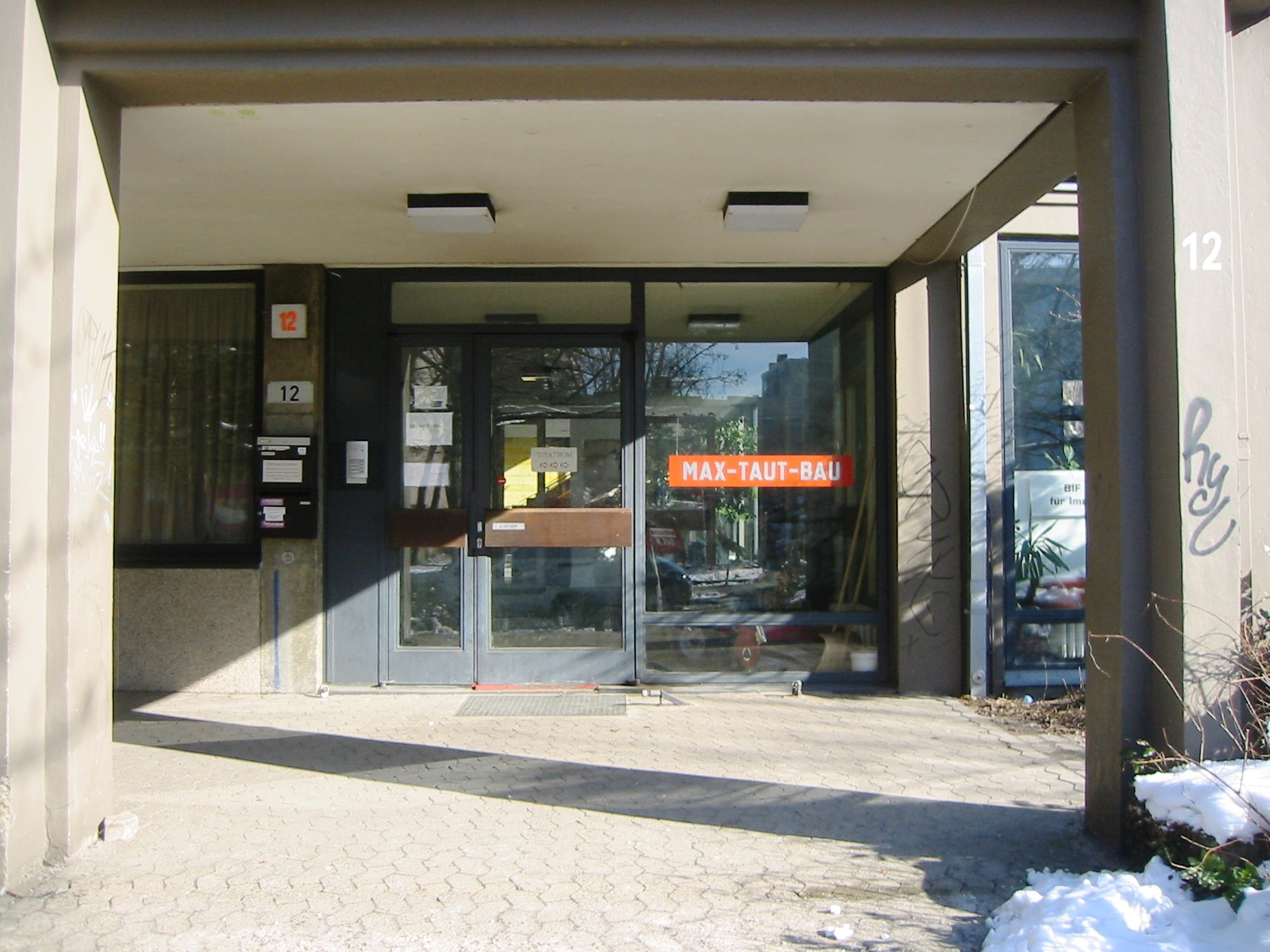 Eingang zum ehemaligen Hauptkinderheim von Max Taut in der Alten Jakobstraße/Ritterstraße in Berlin-Kreuzberg